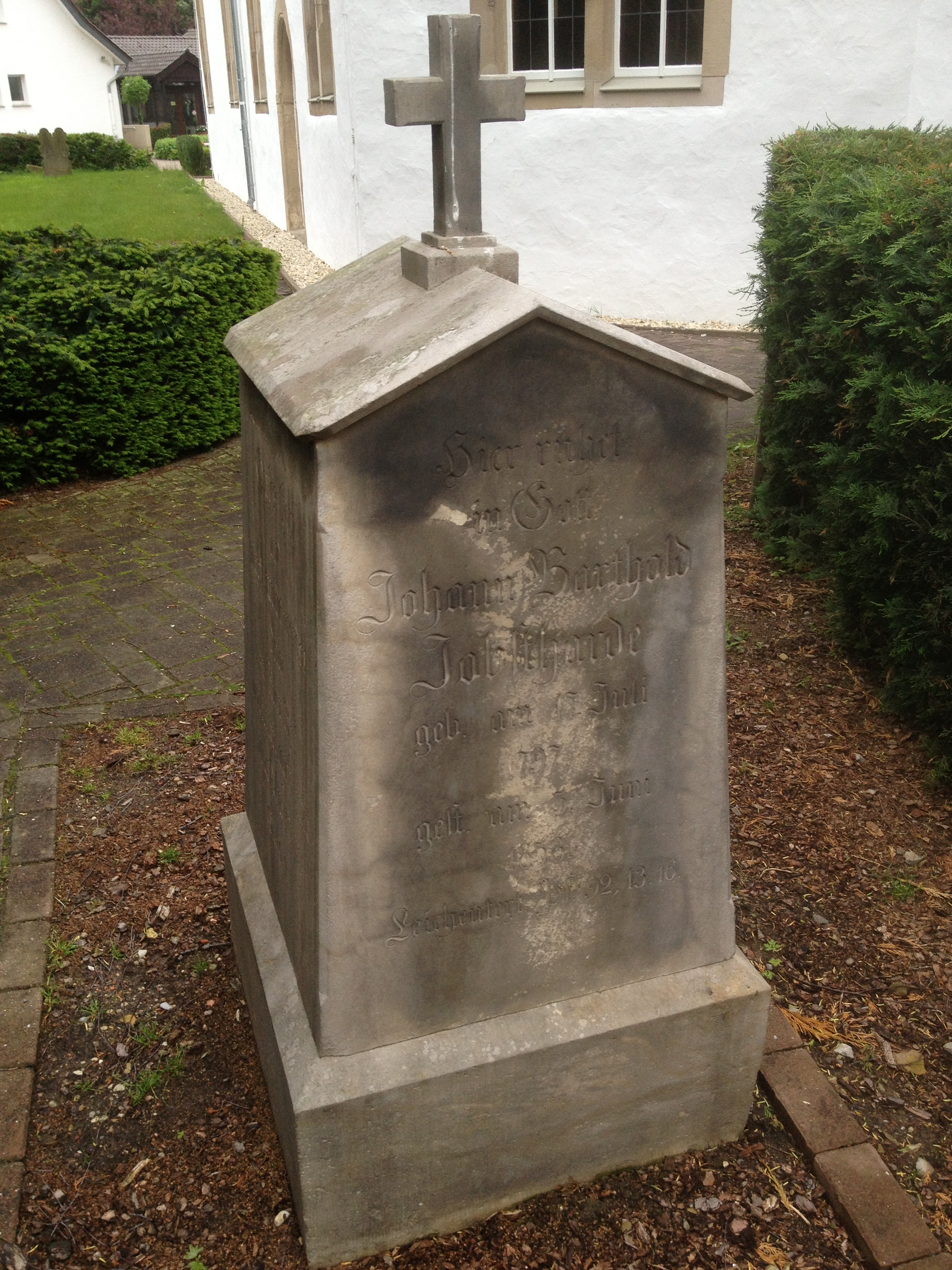 Deutschland - Nordrhein-Westfalen - Bad Salzuflen - Wüsten: Grabstein bei der Evangelischen Kirche